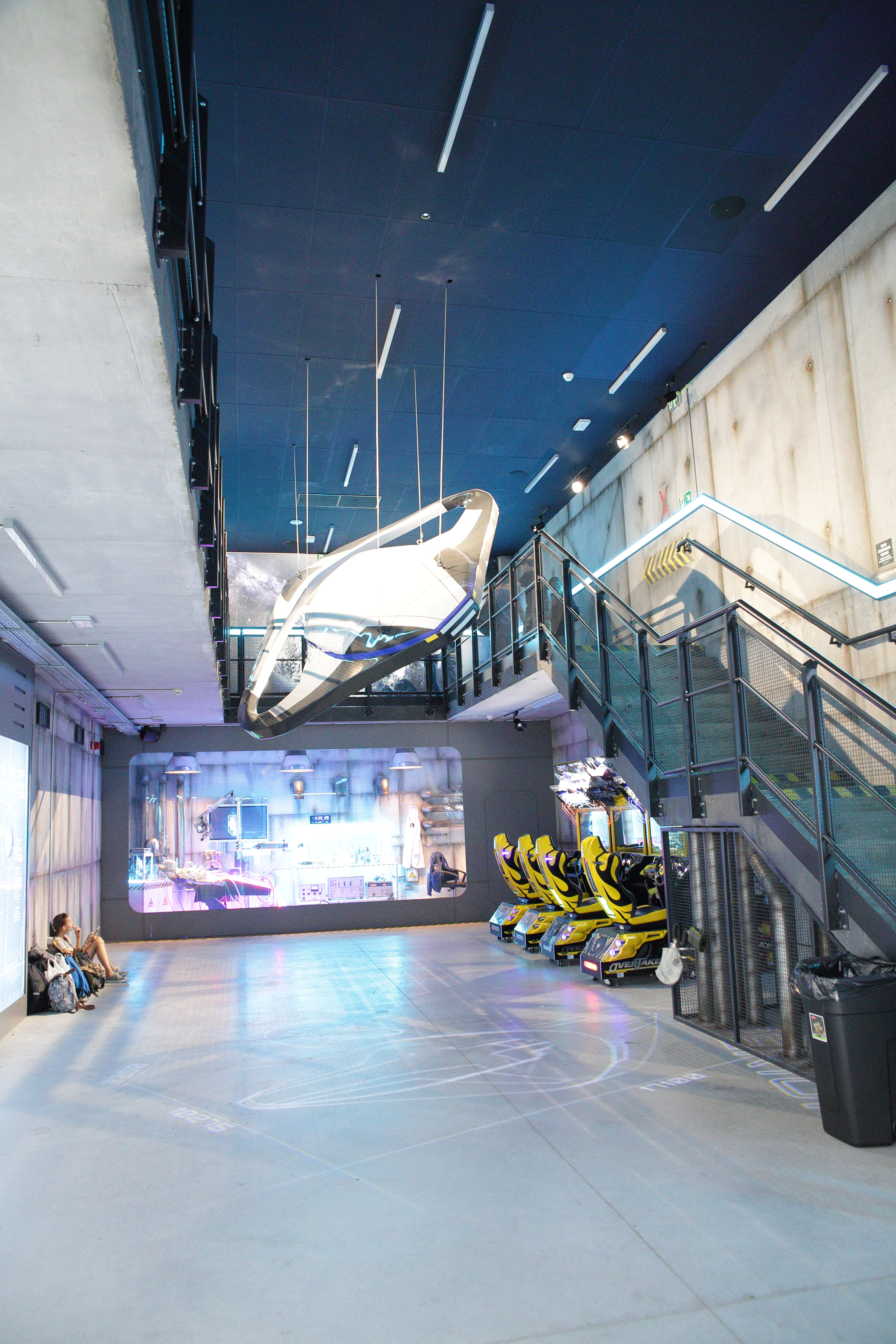 Wnętrze stacji roller coastera Hyperion w parku Energylandia w Zatorze.